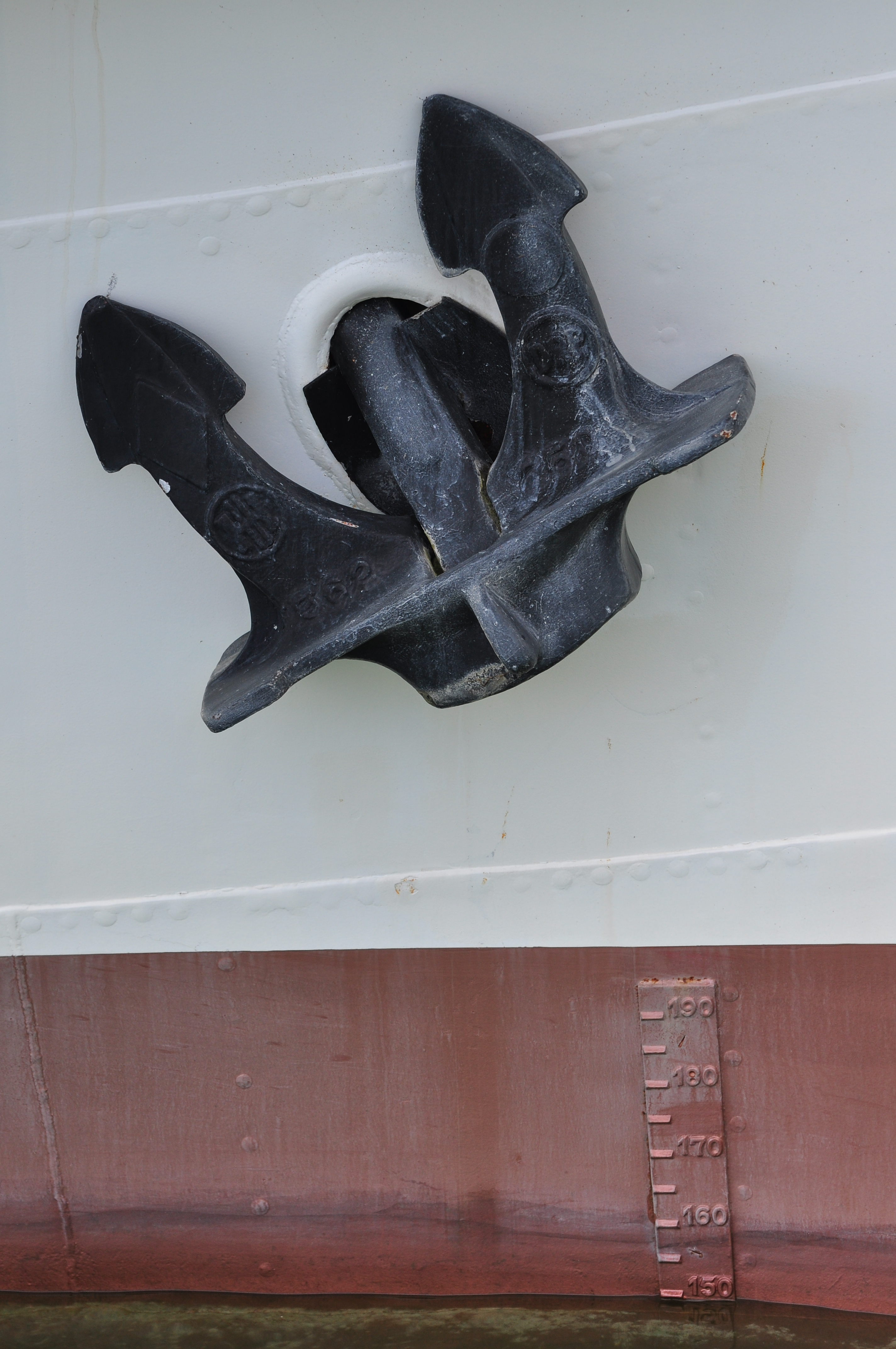 Zürichsee-Schifffahrtsgesellschaft (ZSG) MS Linth at Bürkliplatz in Zürich (Switzerland)